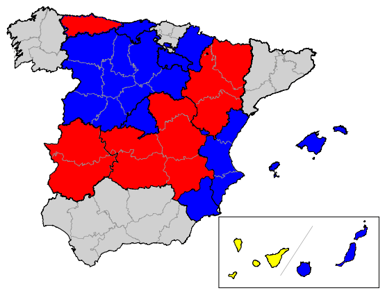 Elecciones comunitarias en España, del año 2003 (por provincias)